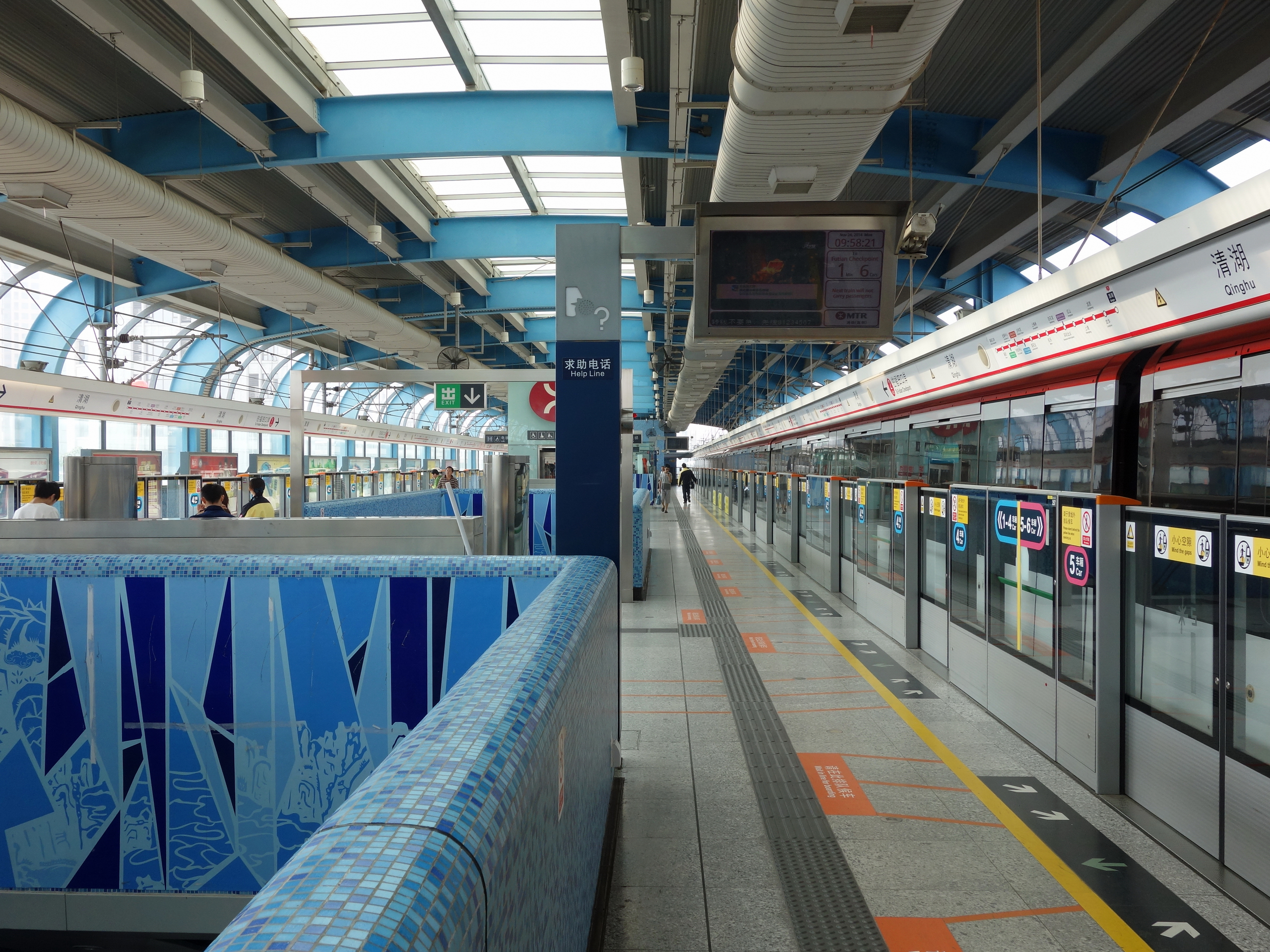 深圳地铁龙华线清湖站站台